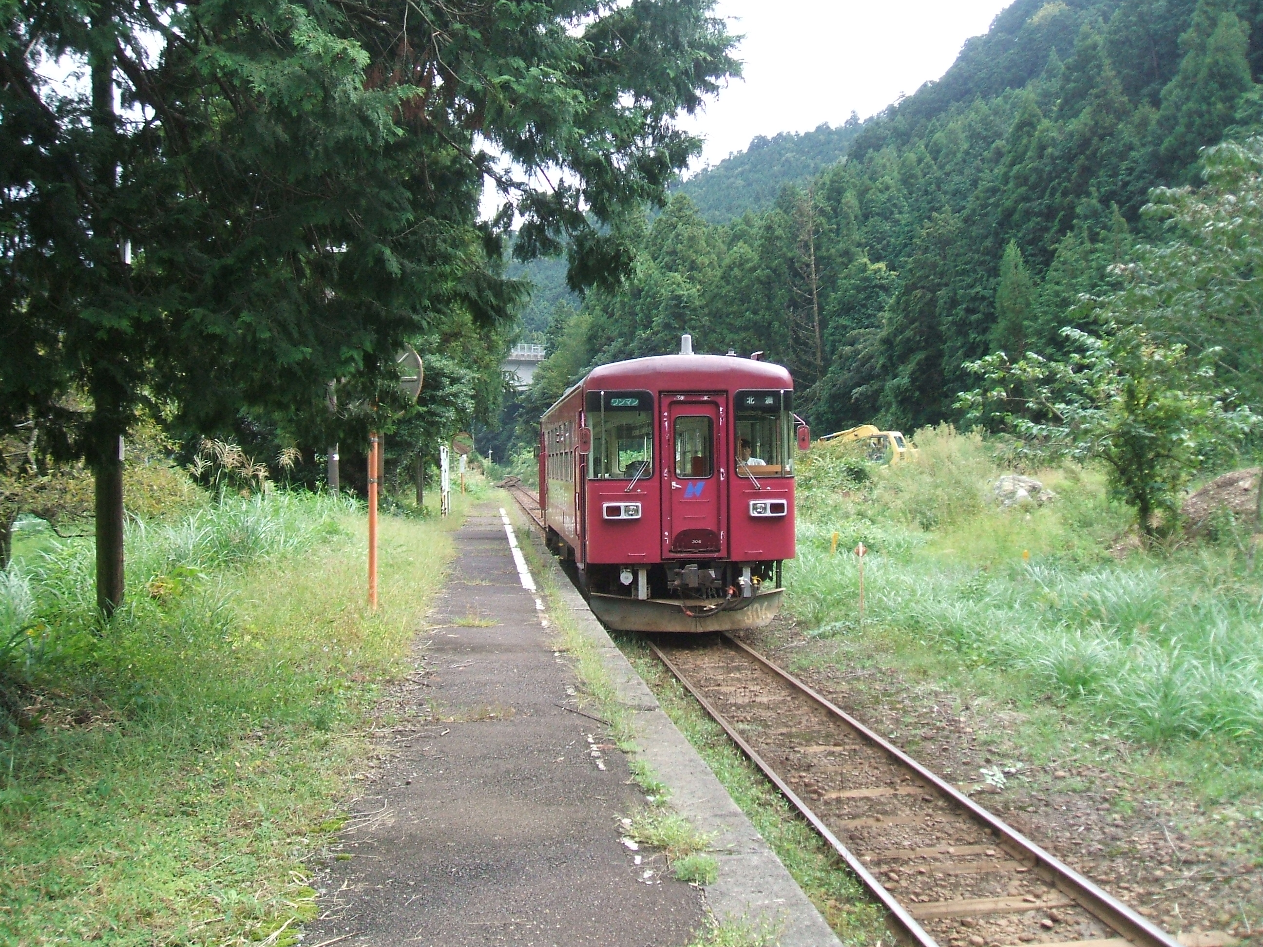 母野駅停車中の列車。(306号車)